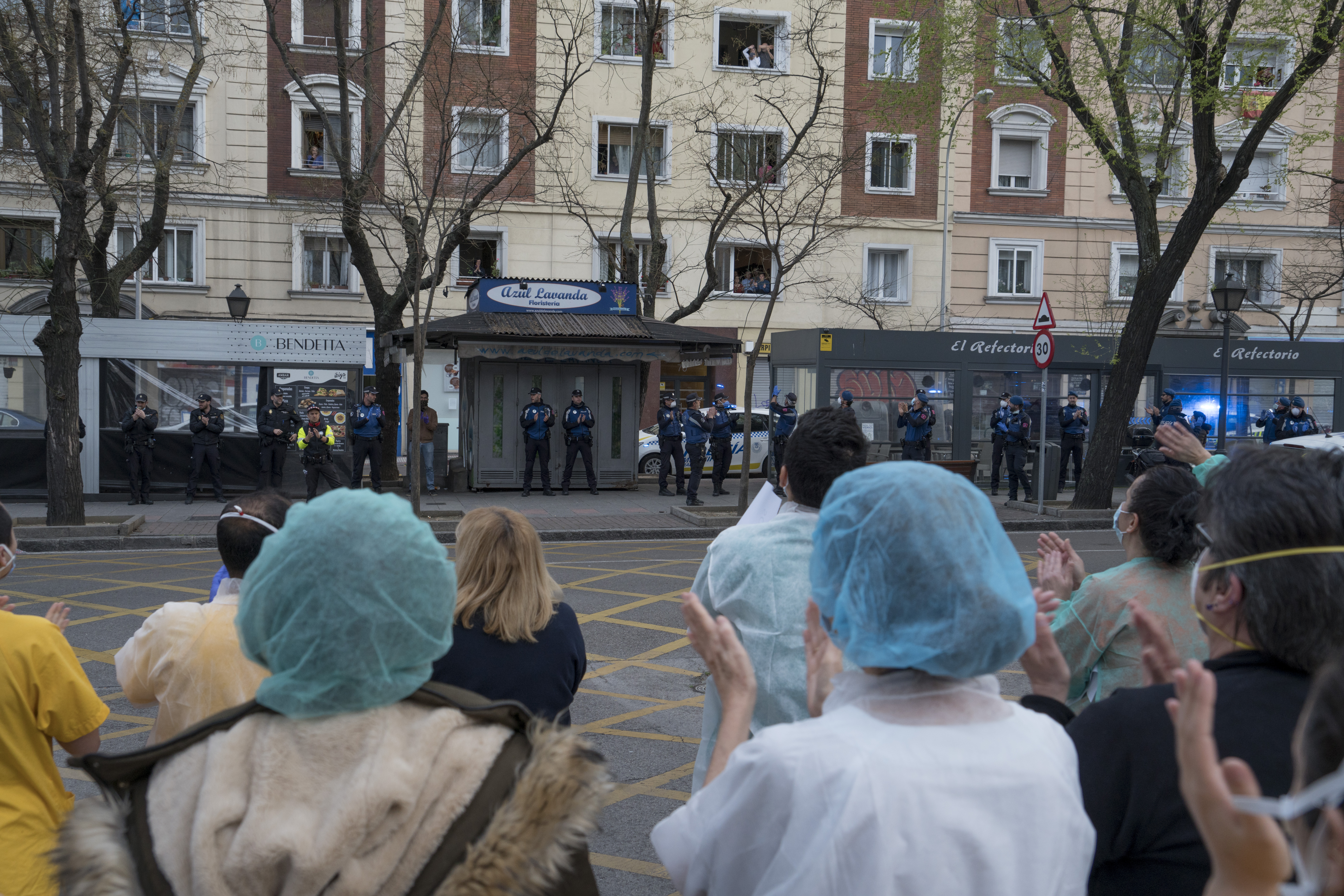 Hospital Gregorio Marañón. Sanitarios y policía municipal se dedican los aplausos. 29 de marzo.